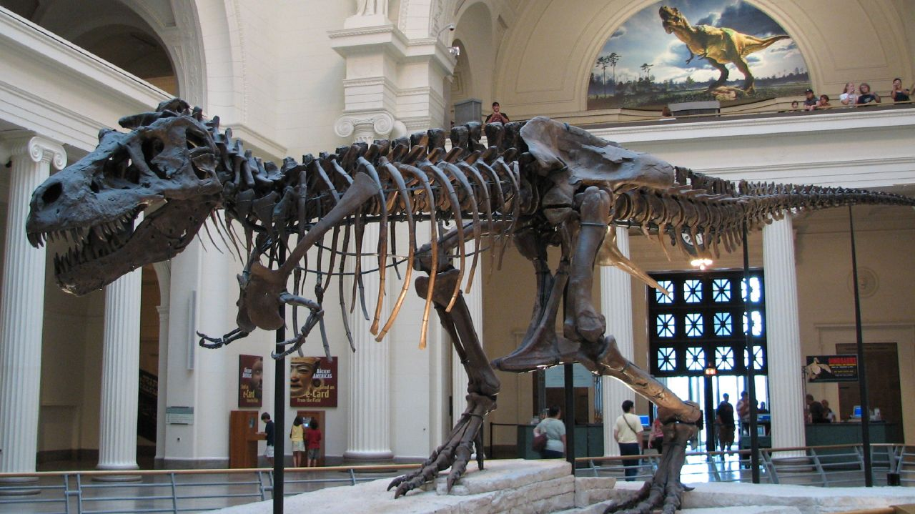 Sue, tyrannosaurus rex